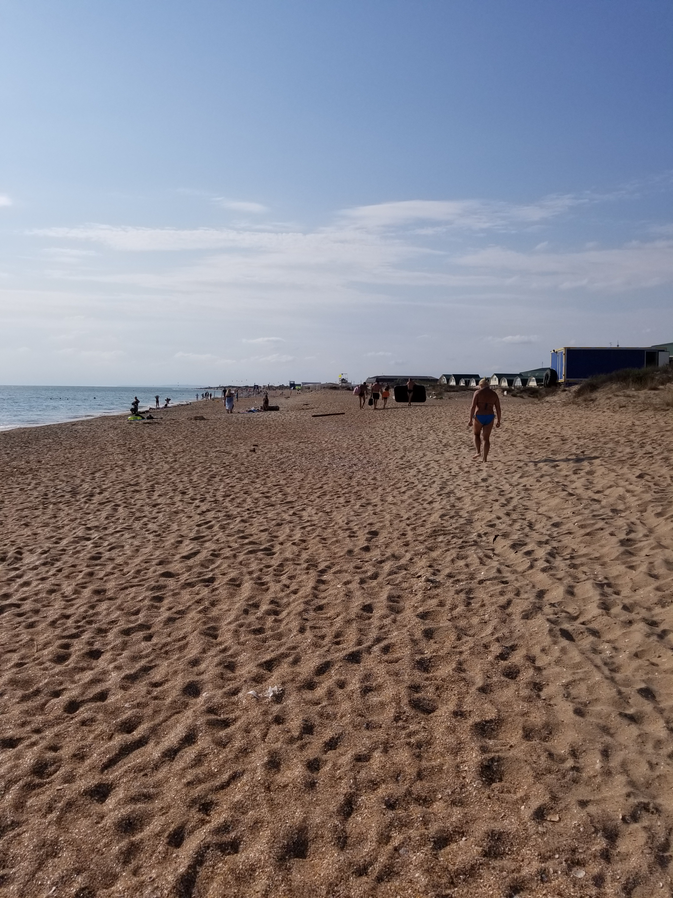 Пляж на Бугазской косе (2017). Вид в сторону Тамани.